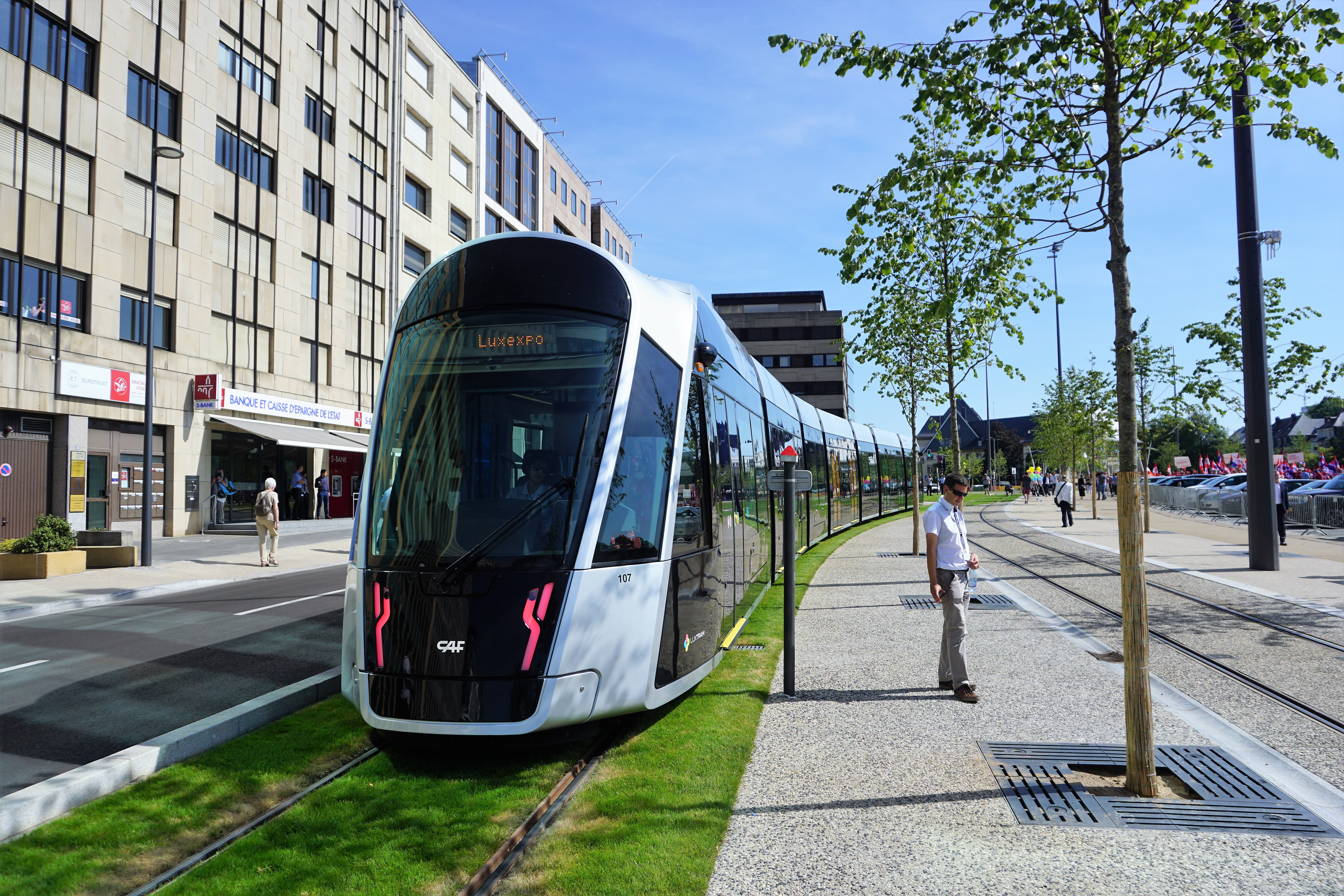 Luxembourg, tram à l'allée Scheffer.